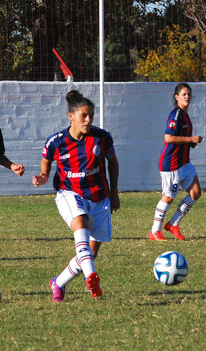 La capitana de San Lorenzo disputando el clásico frente a Huracán en el predio "La Quemita".